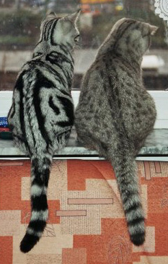 Vergleich einer BKH Classic Tabby mit Spotted Tabby Zeichnung